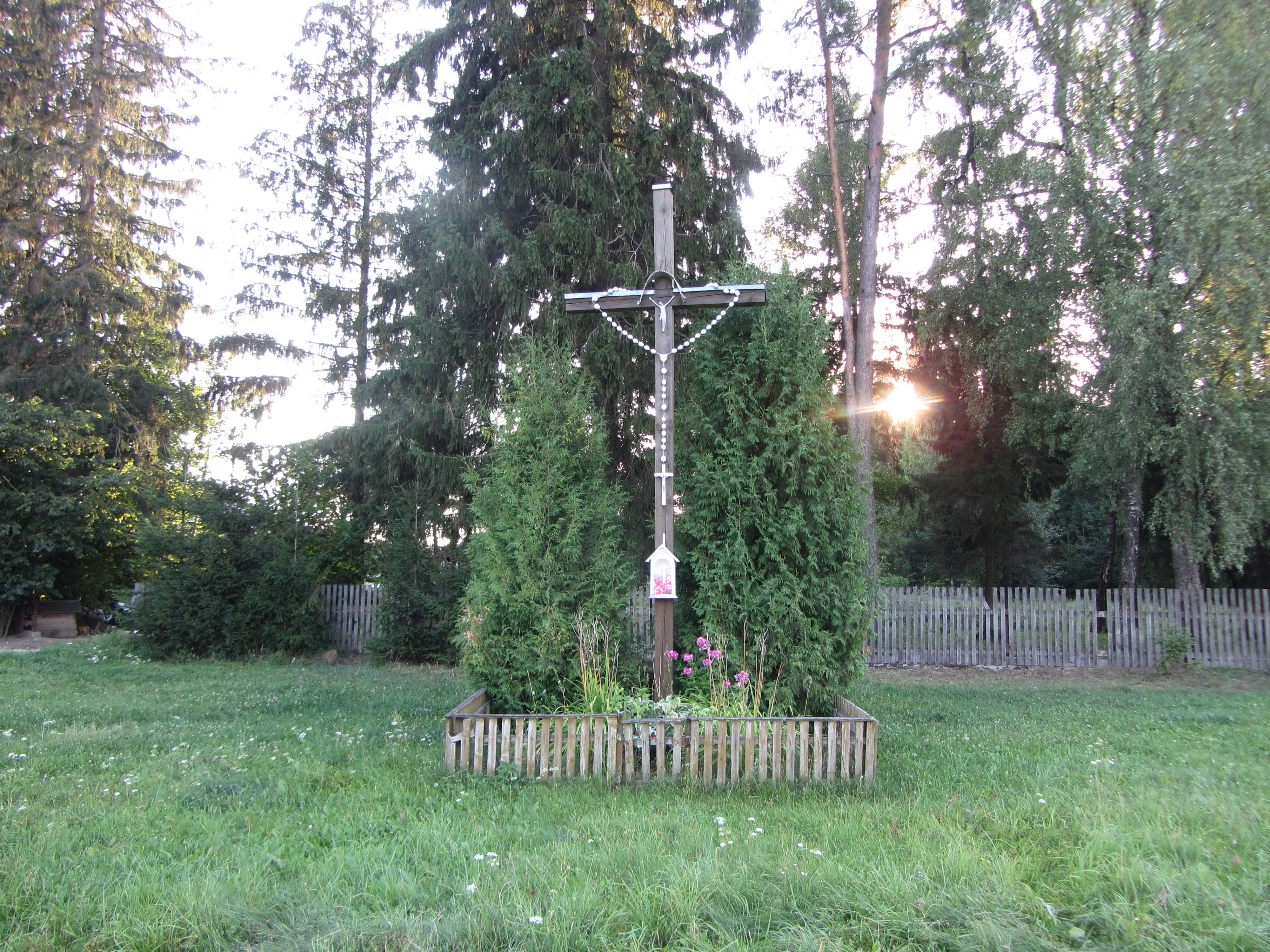 Keidžiai, Lithuania